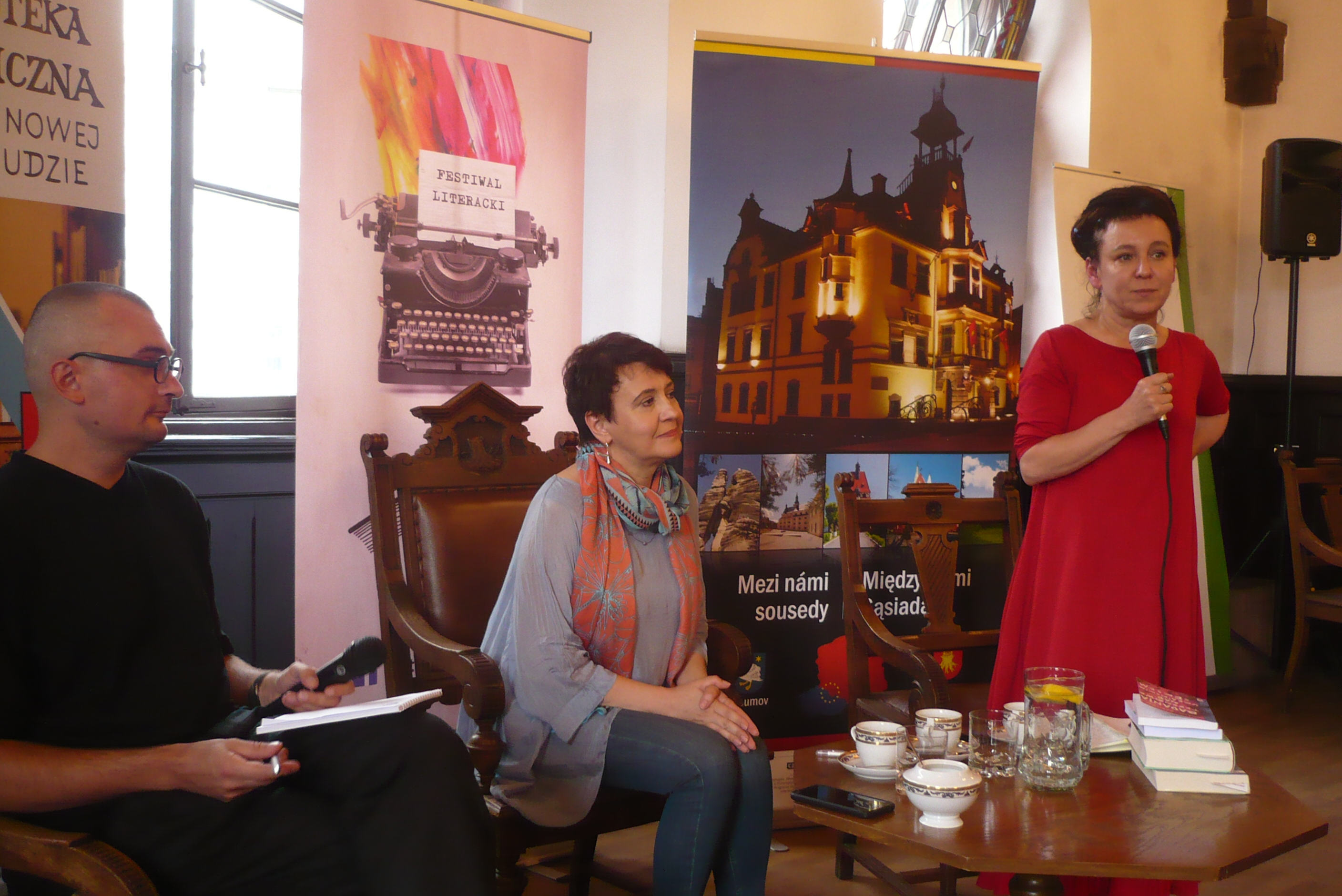 Marcin Gaczkowski, Oksana Zabużko, Olga Tokarczuk. Festiwal Góry Literatury, 2018